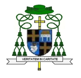 Wappen Walter Kasper *1933, Bischof von Rottenburg-Stuttgart (1989-1999)